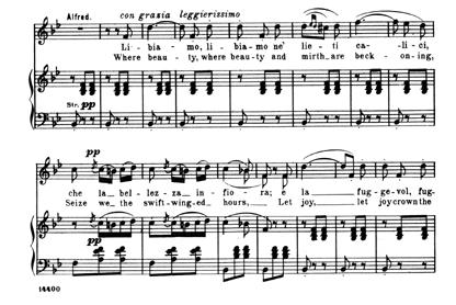 Le prime 15 battute di Libiamo ne' lieti calici, un celebre episodio in tempo di valzer del primo atto della Traviata di Giuseppe Verdi